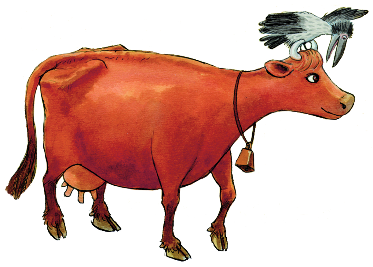 Mamma Mu och Kråkan